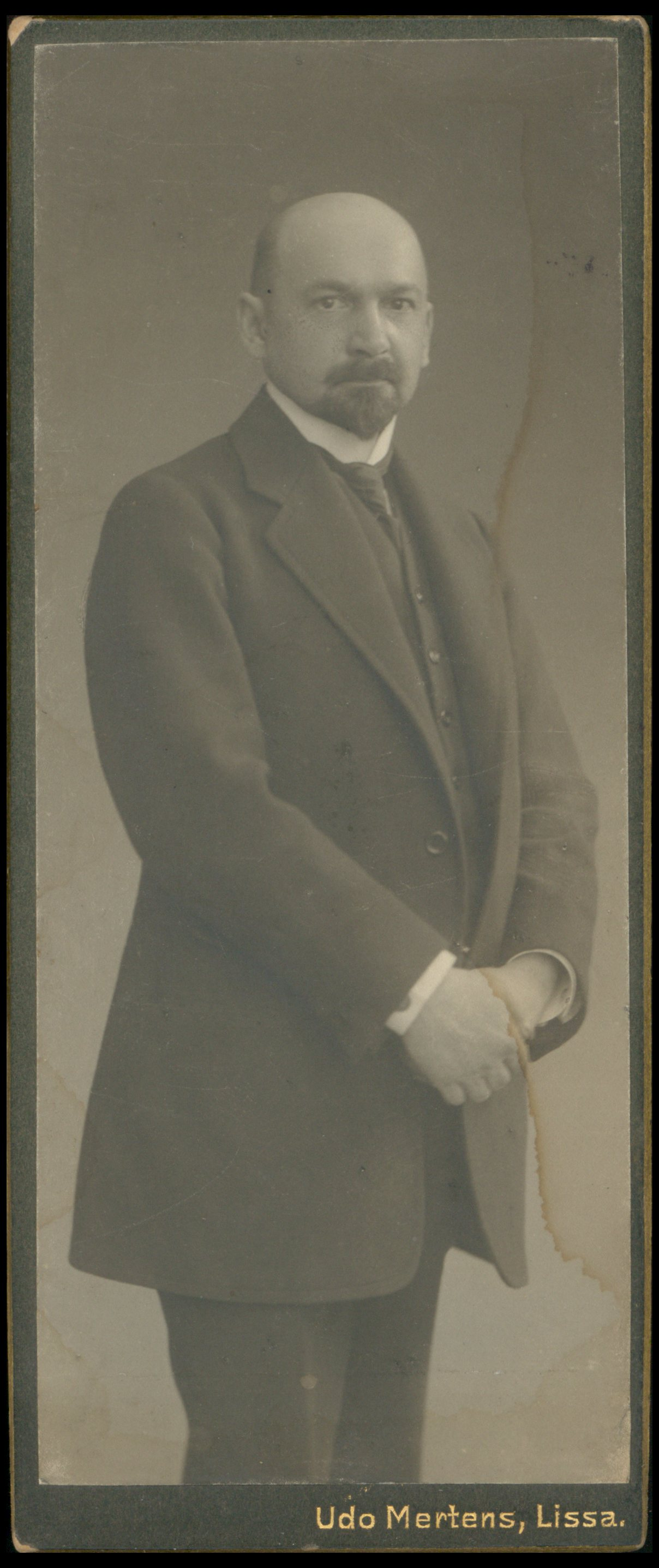 Jan Kazimierz Mycielski, ok. 1910 r.